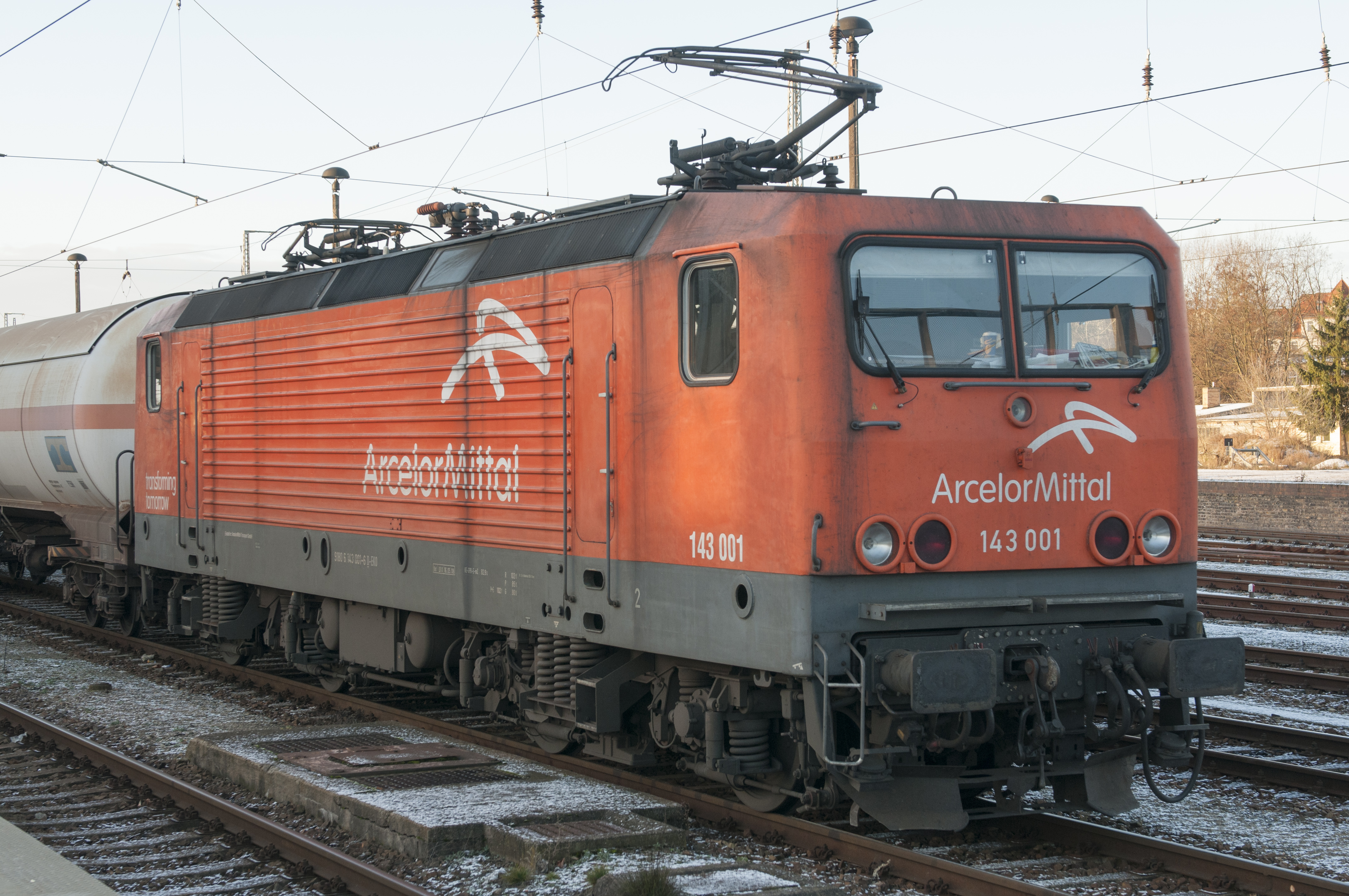 Lokomotive BR 143-001 von ArcelorMittal auf dem Bahnhof Eberswalde